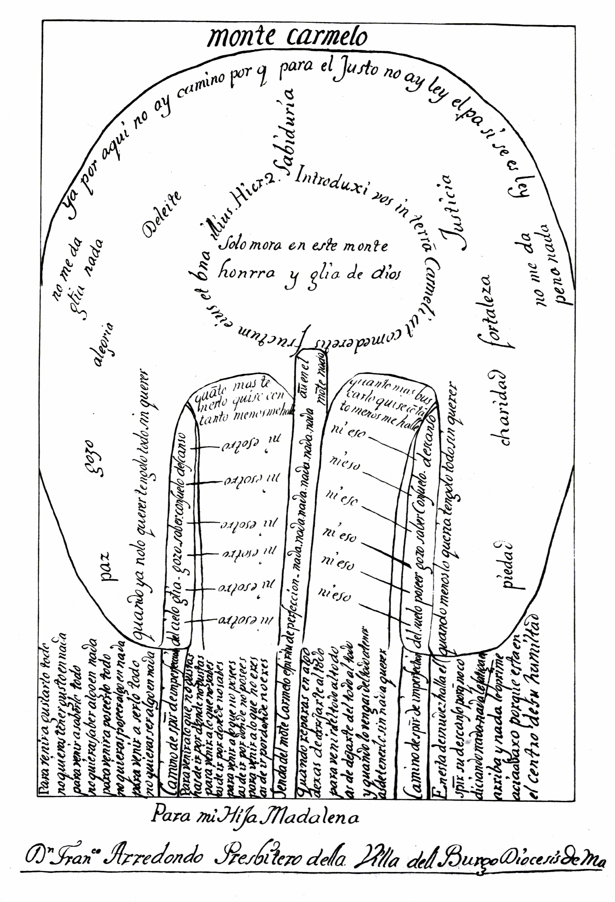 Mapa simbólico del Monte Carmelo dibujado por San Juan de la Cruz. La senda descrita para subir al monte representa el ascenso del alma a la vida espiritual y la paz interior.